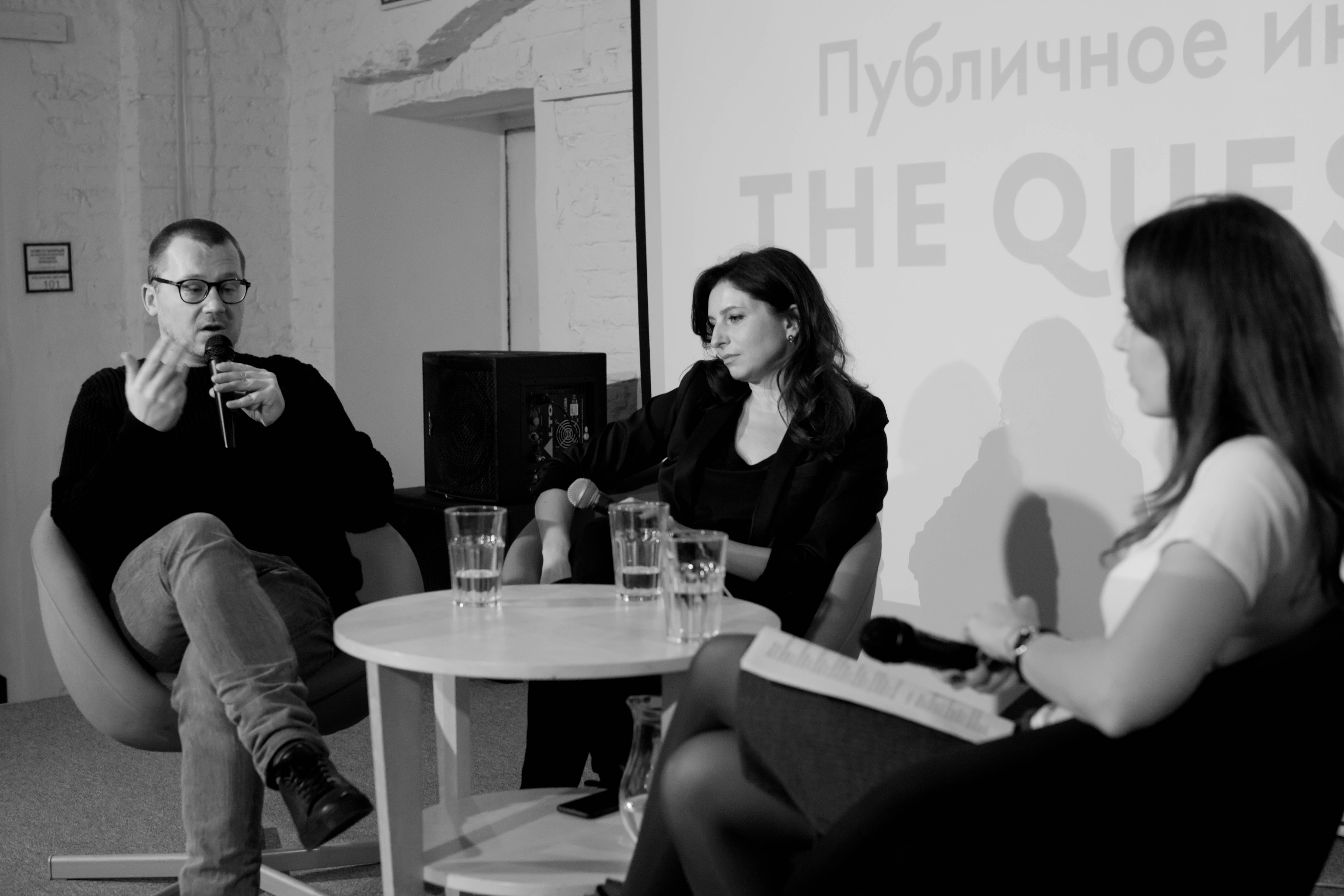 Публичное интервью с Романом Волобуевым и Алисой Хазановой (TheQuestion в Центре фотографии братьев Люмьер, Москва)